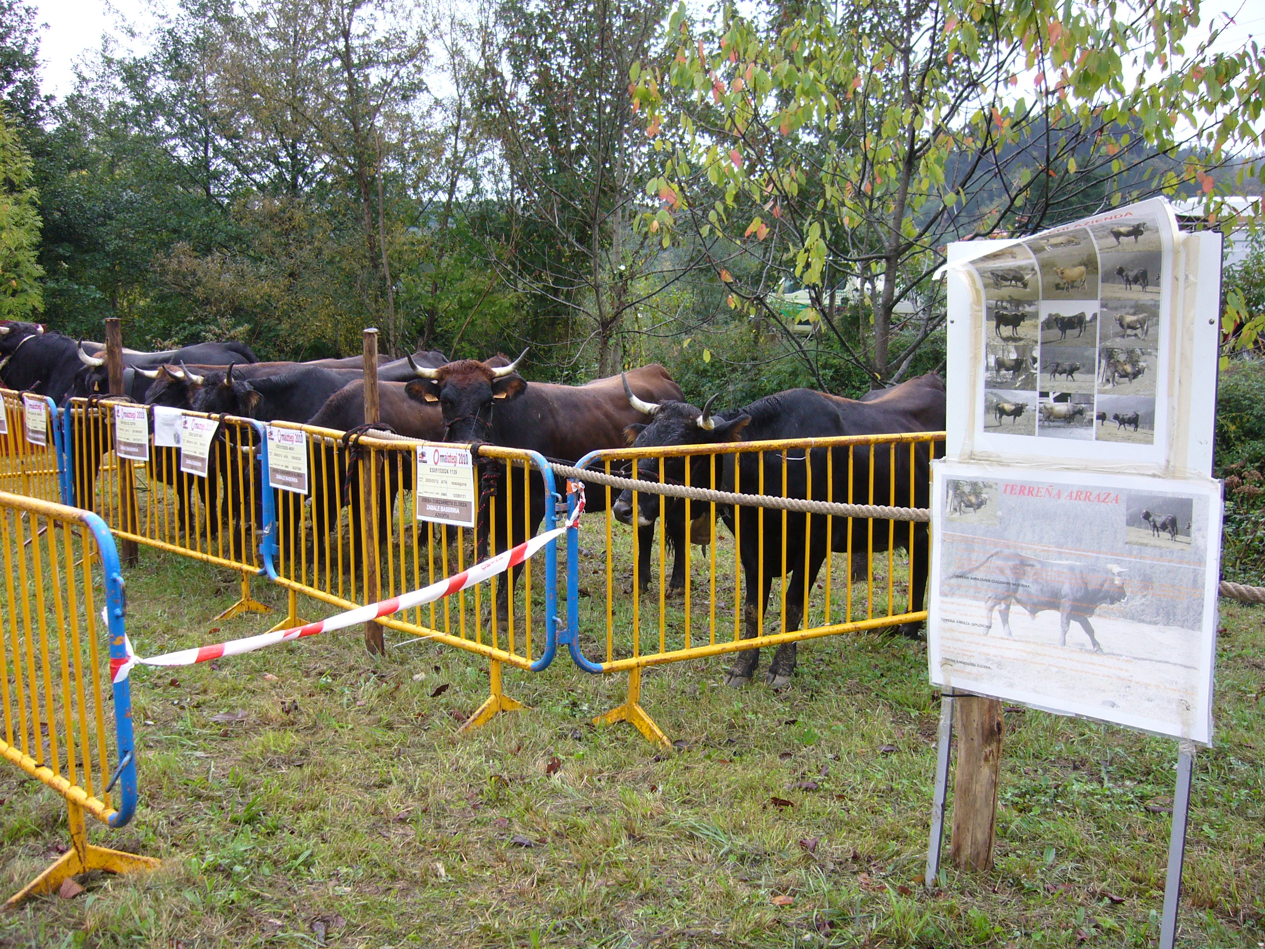 Terreñak Ormaiztegiko azokan